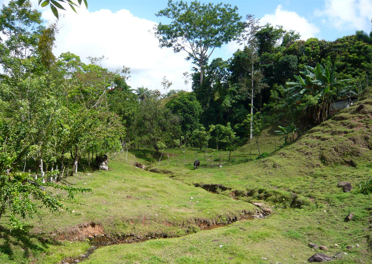 Beitemark i Guatuso i Costa Rica